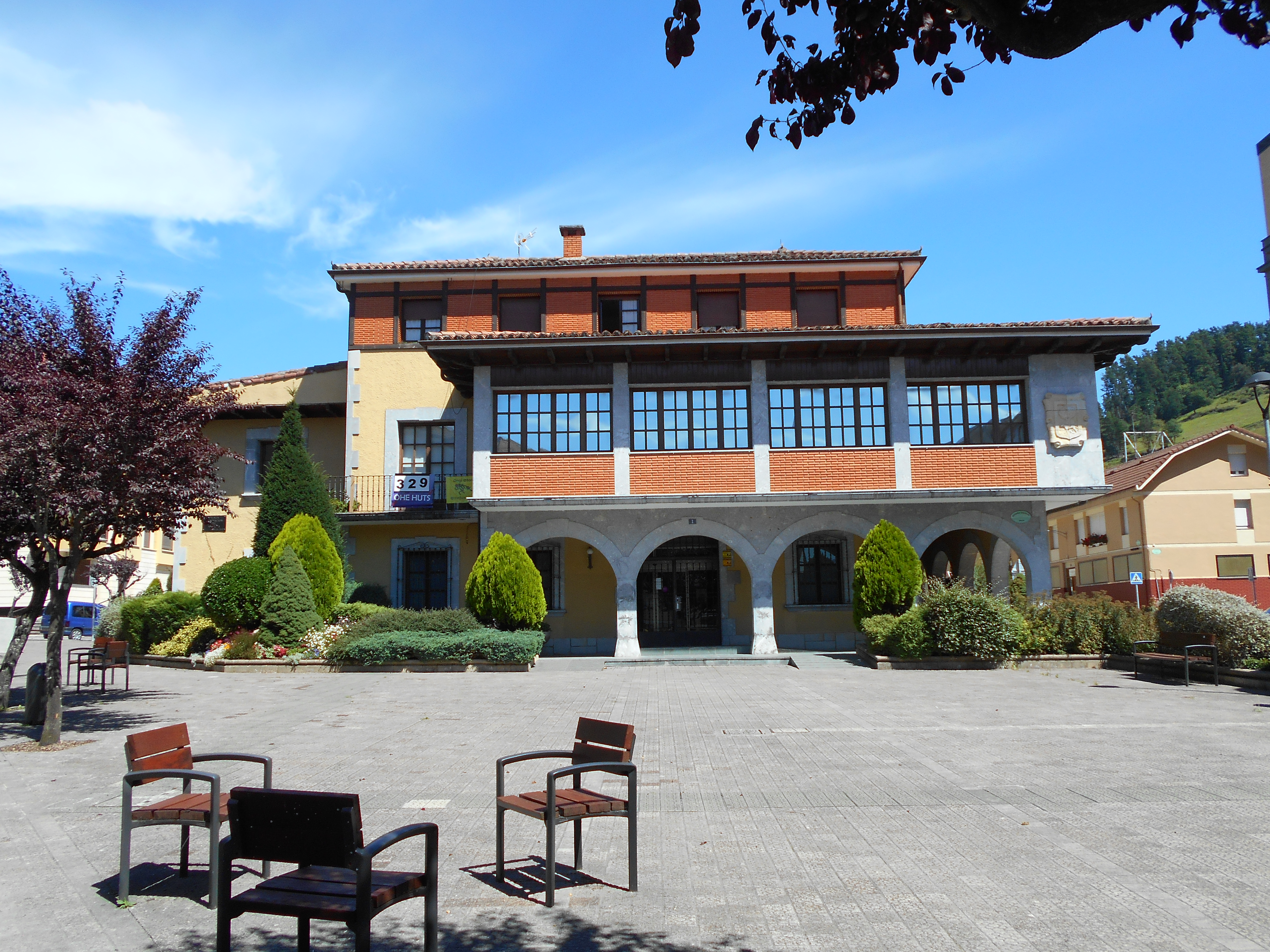 Ayuntamiento de Zaldibar